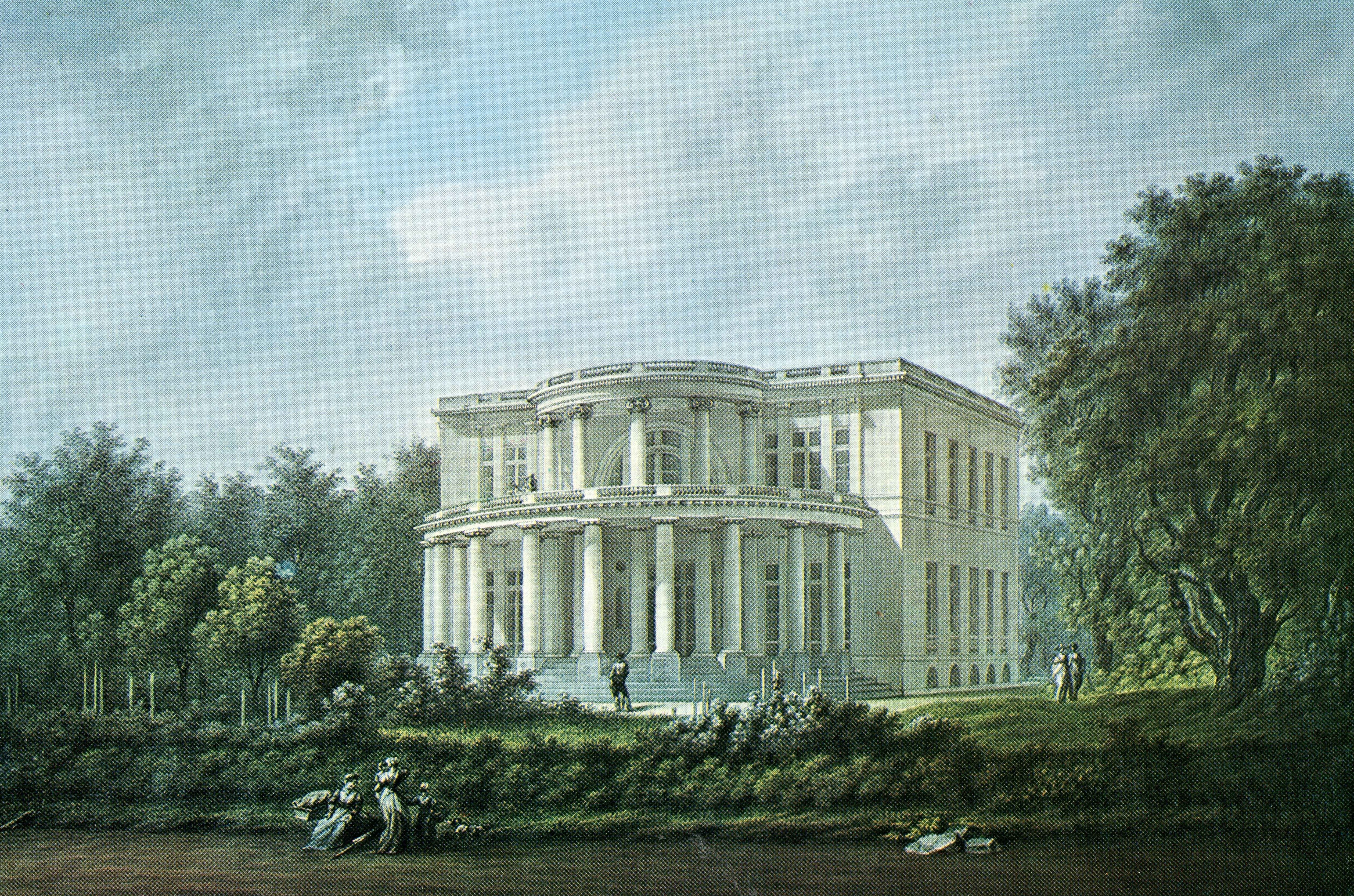 Säulenhaus, Aquarell von Carl Friedrich Stange um 1825